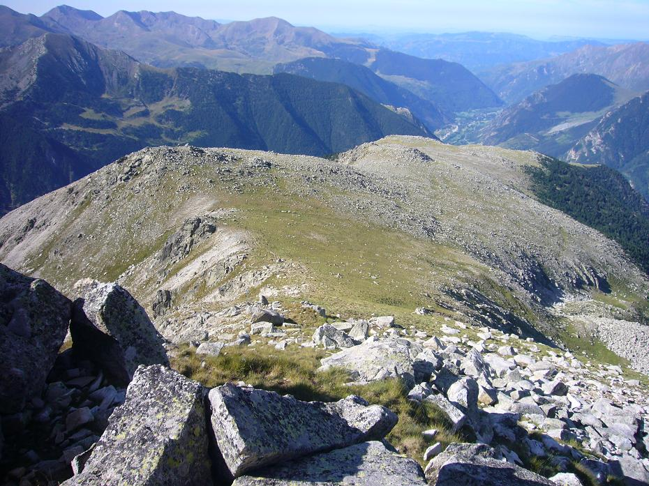 El Campo, vist des dels Pics de Comaltes; la Vall de Boí, Alta Ribagorça, Catalunya